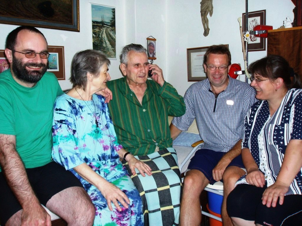 Rodina Luboše a Lídy Hruškových